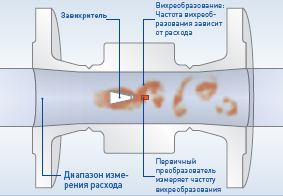 Принцип действия вихревых расходомеров